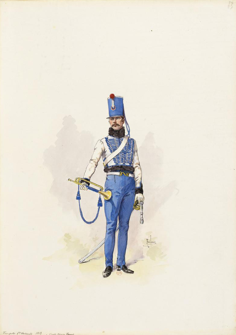 Trompette du 1er Hussards en 1813